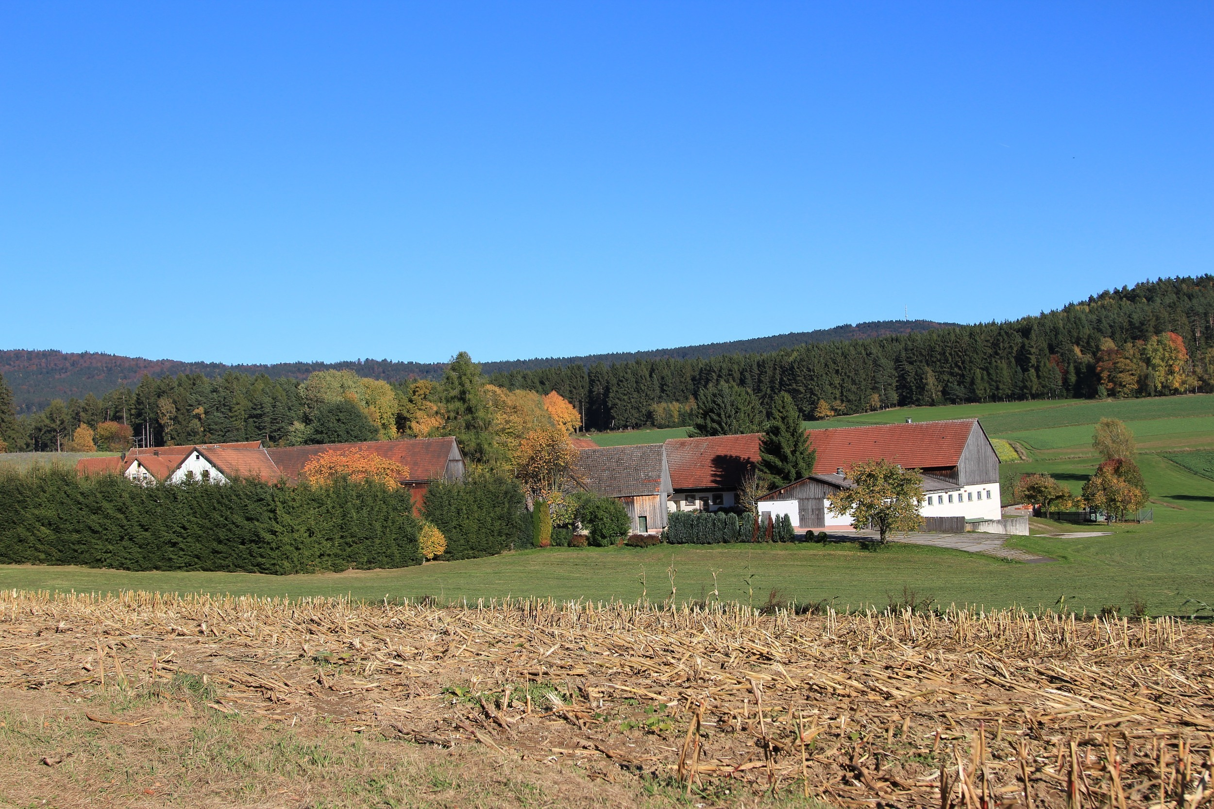 Ort Windhals im Markt Winklarn